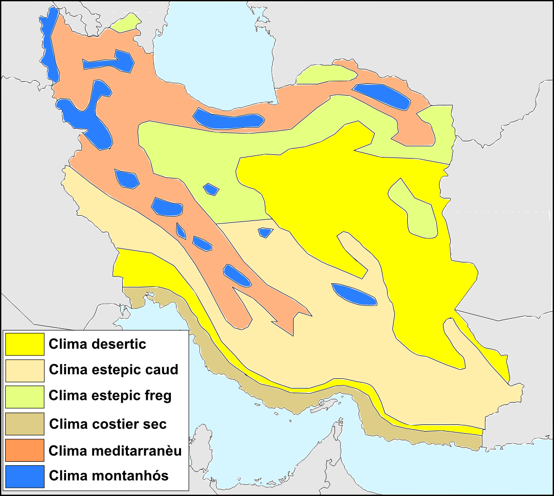 Esquèma dau clima iranian.